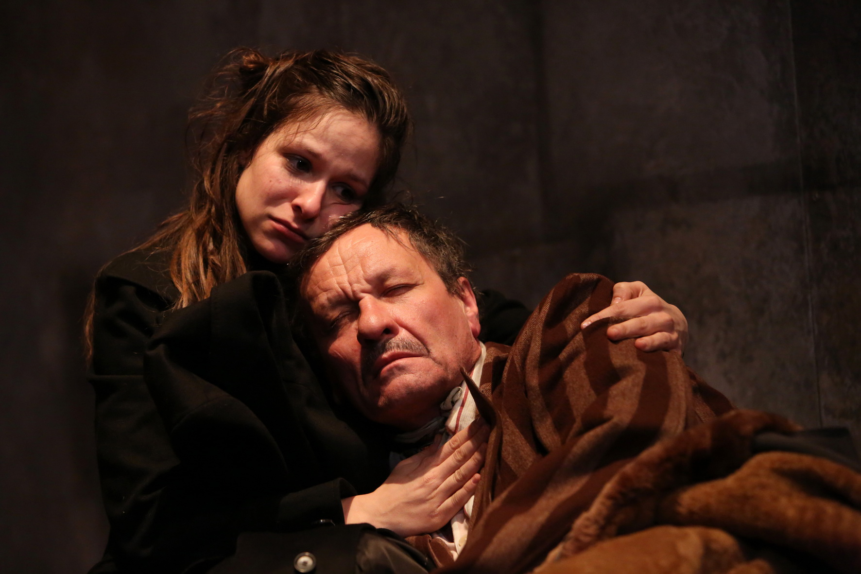 Anton Pavlovič Čechov: Racek, představení v Dejvickém divadle, Nina Zarečná (Veronika Kubařová), Petr Sorin (Miroslav Krobot).